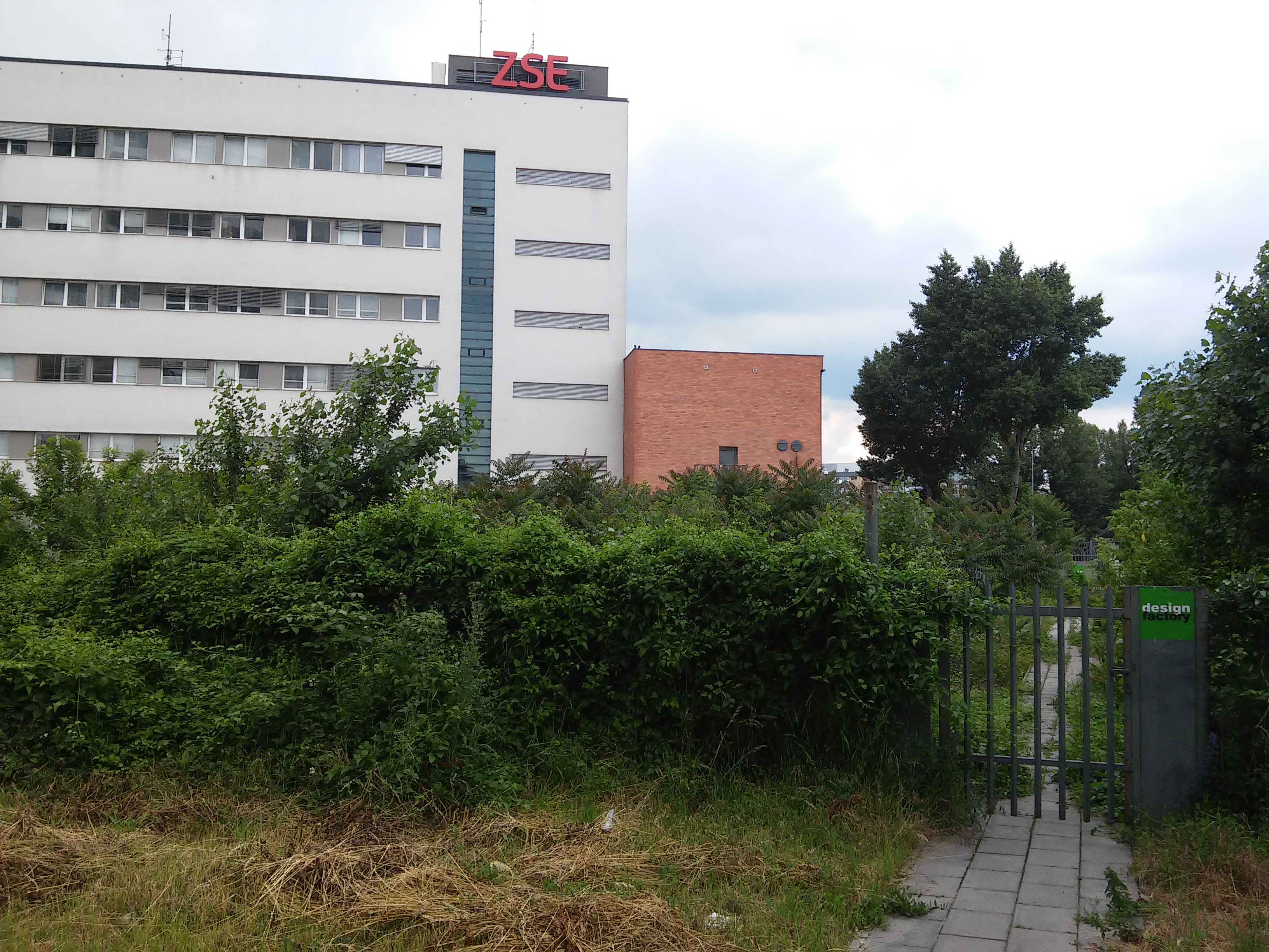 Design factory, Staré Mesto, Bratislava